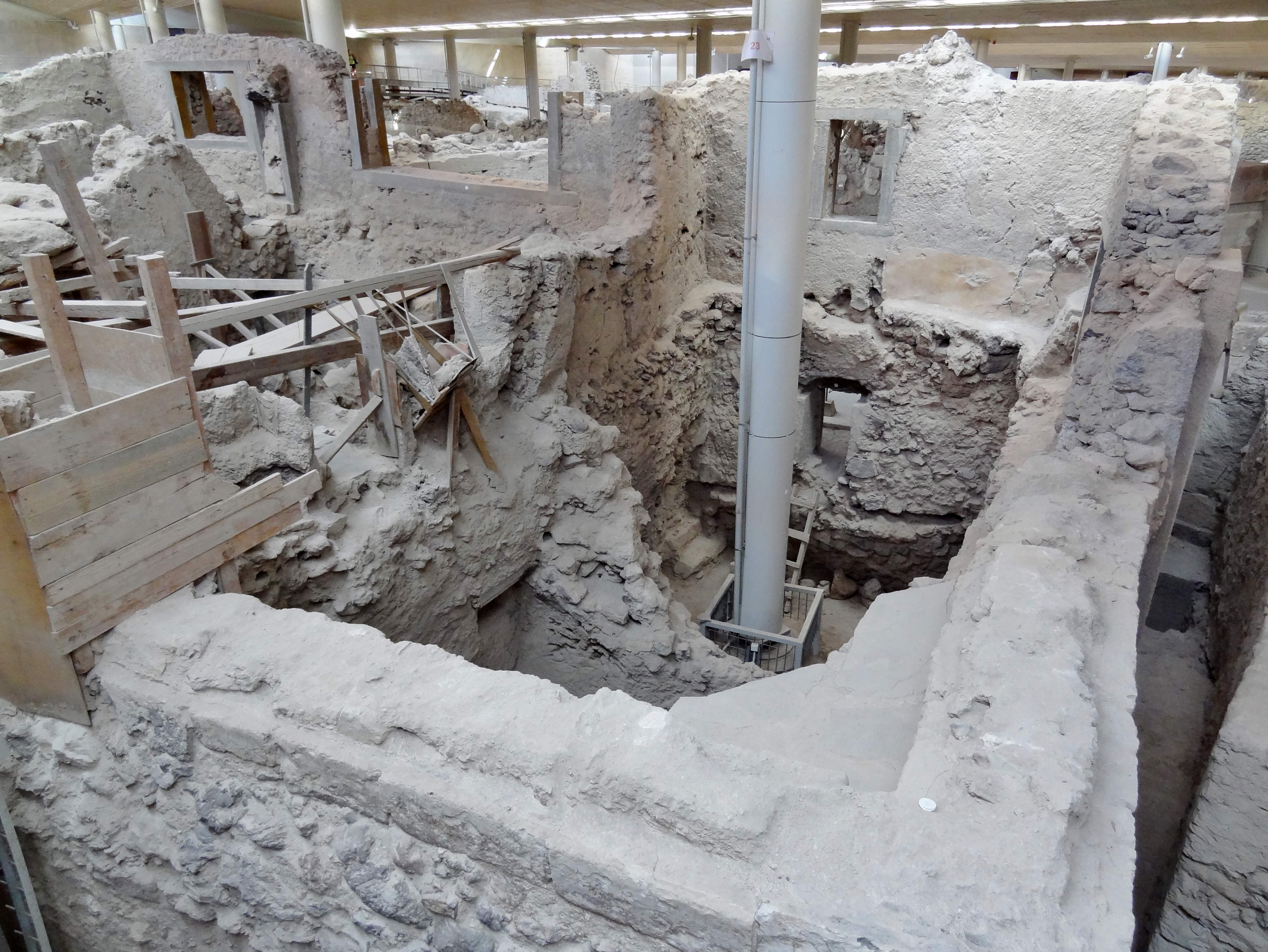 Ausgrabungsstätte von Akrotiri auf Santorin, Kykladen, Griechenland